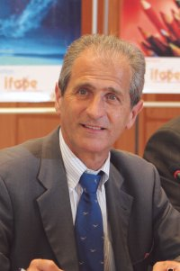 Hubert Falco